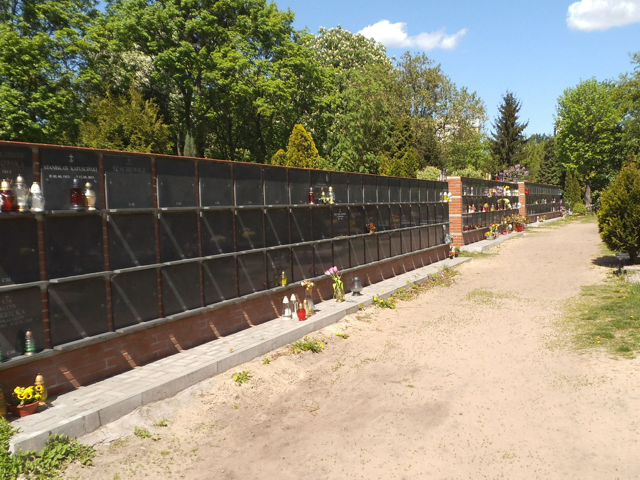 Kolumbarium w Toruń